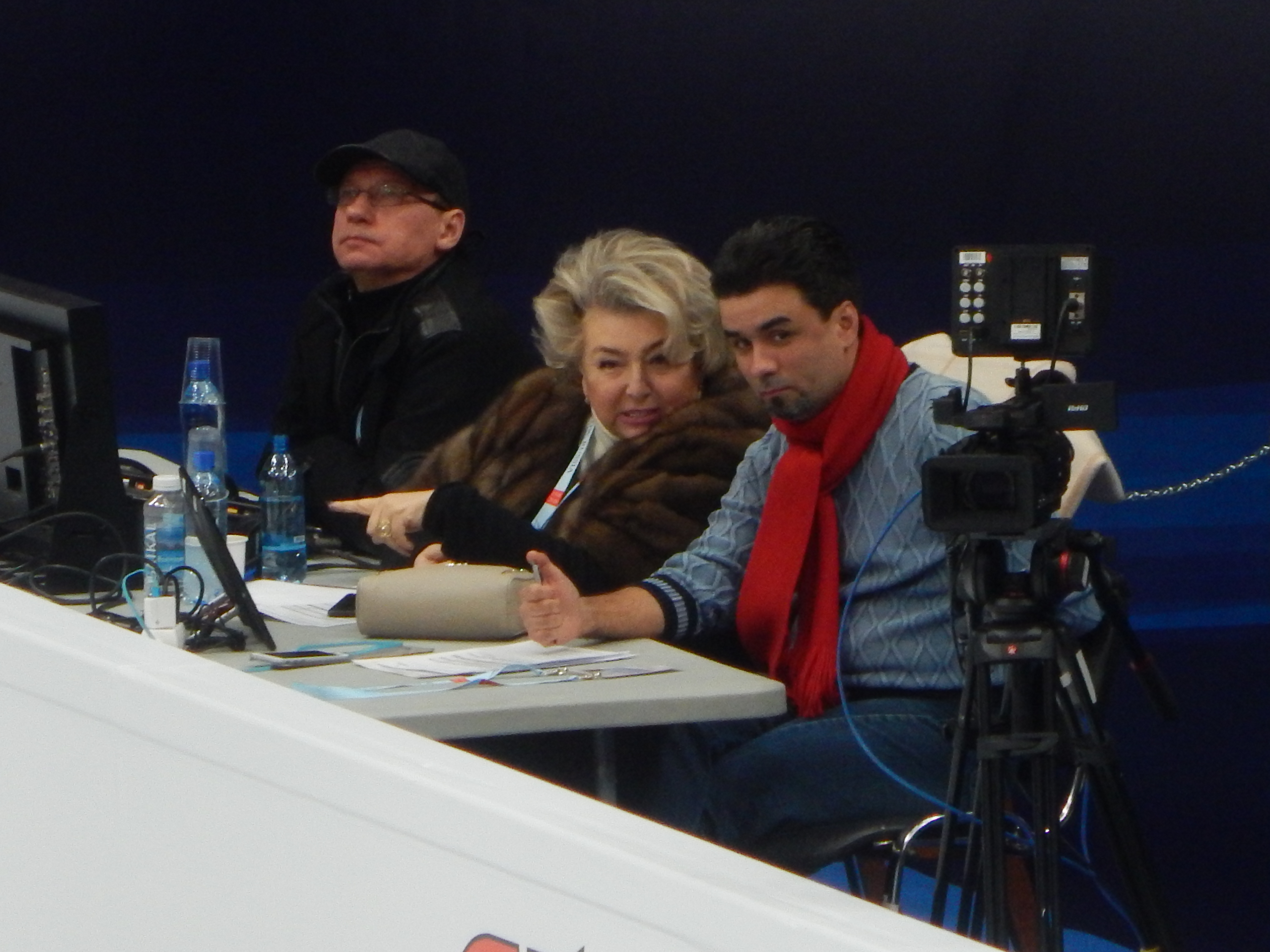 Чемпионат Европы по фигурному катанию 2018 в Москве. Первый день соревнований (17 января). Тренер по фигурному катанию Татьяна Тарасова и комментатор Матч ТВ Александр Гришин